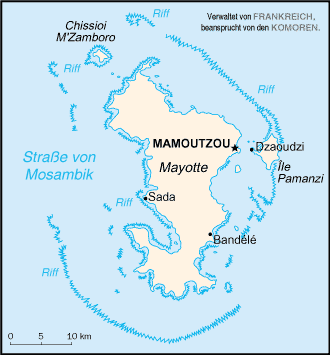 Karte von Mayotte (markiert)